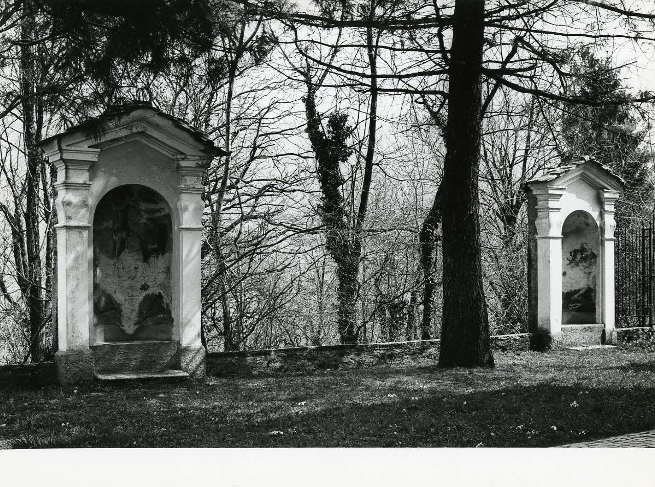 Serie fotografica : Agra, 1979 / Paolo Monti. - Stampe: 2 : Positivo b/n, gelatina bromuro d'argento/ carta, 18x24. - ((Al verso delle stampe manoscritto numero di negativo corrispondente: 3277/18-19. La suddetta serie è contenuta nella scatola identificata con il n. 8. Sul coperchio iscrizione manoscritta a pennarello: "Paesaggi rurali". - Fonte: Quaderno di Paolo Monti: Leica 1501-3000 Controllo numerazione (1950-1978), presso Archivio Paolo Monti